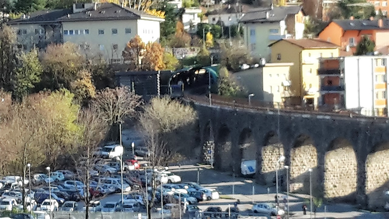 San Bartolomeo - La stazione dell'ospedale